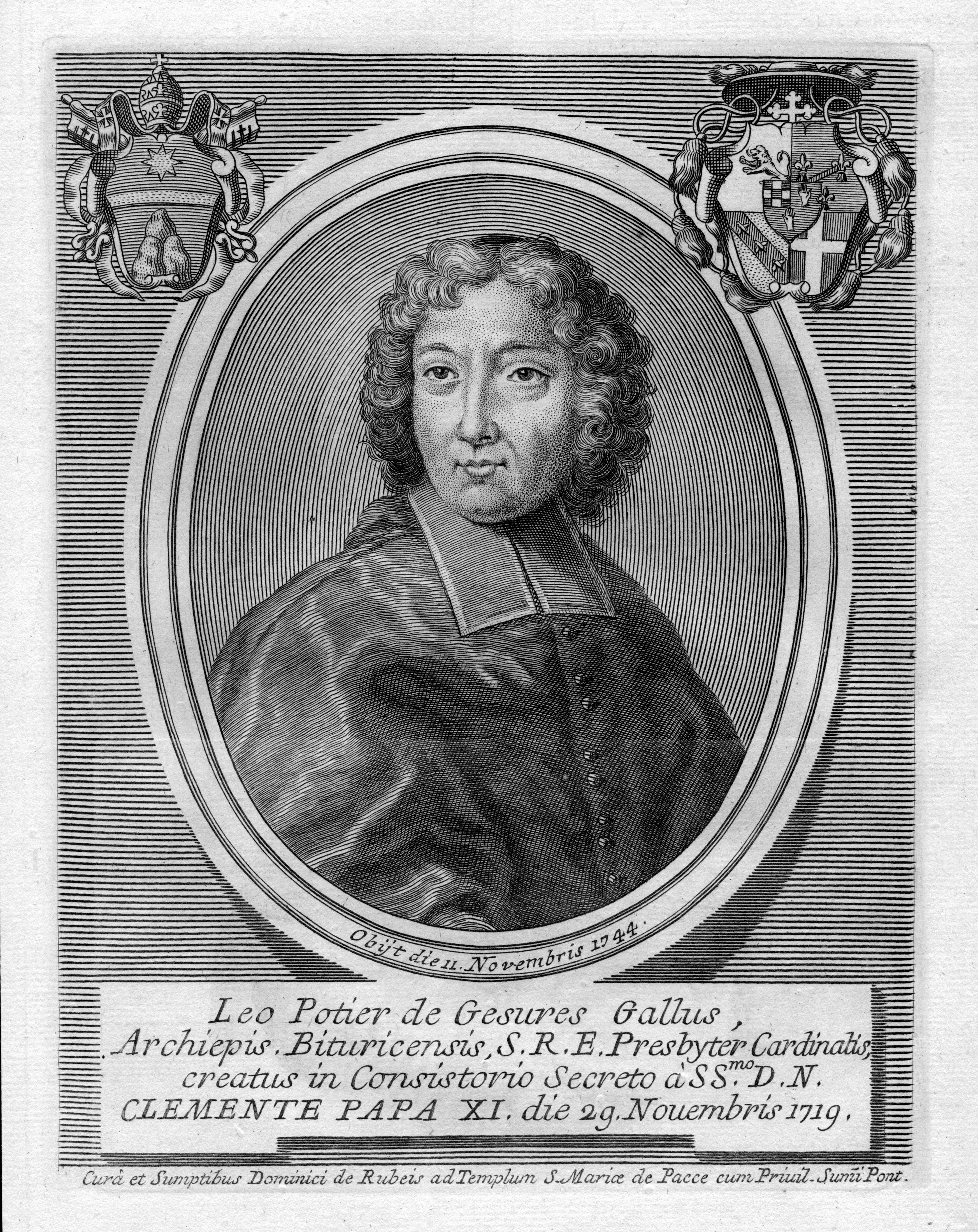 portrait gravé